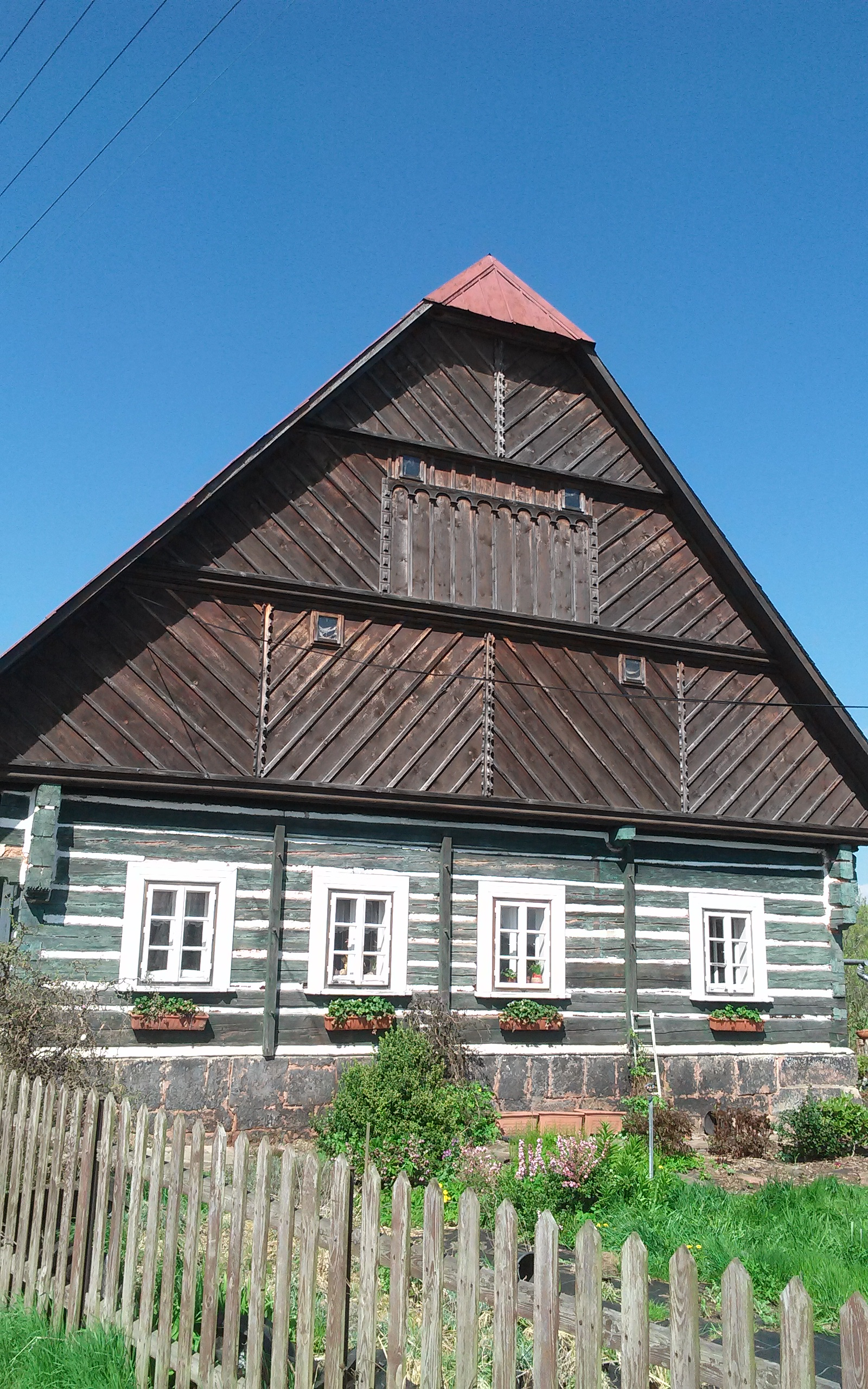 Venkovská usedlost (Borovnice), u železničního přejezdu 22, Borovnice